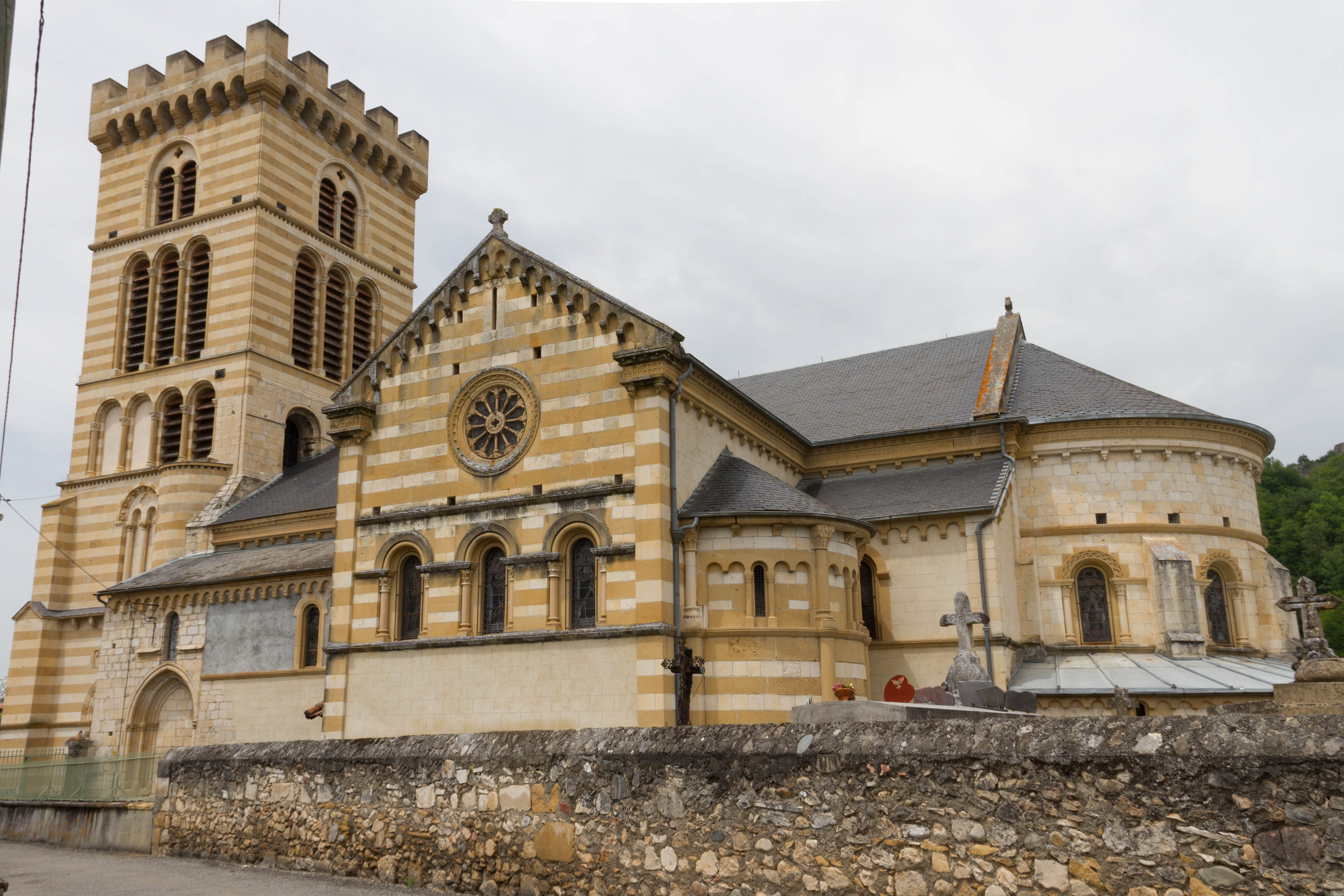 Vue générale